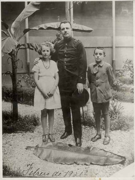 Retrato de Carlos Ibañez del Campo junto a sus hijos Carlos y Rosa Ibañez Quiroz.